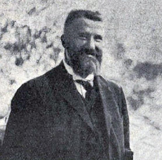 Etienne Billières en 1925.